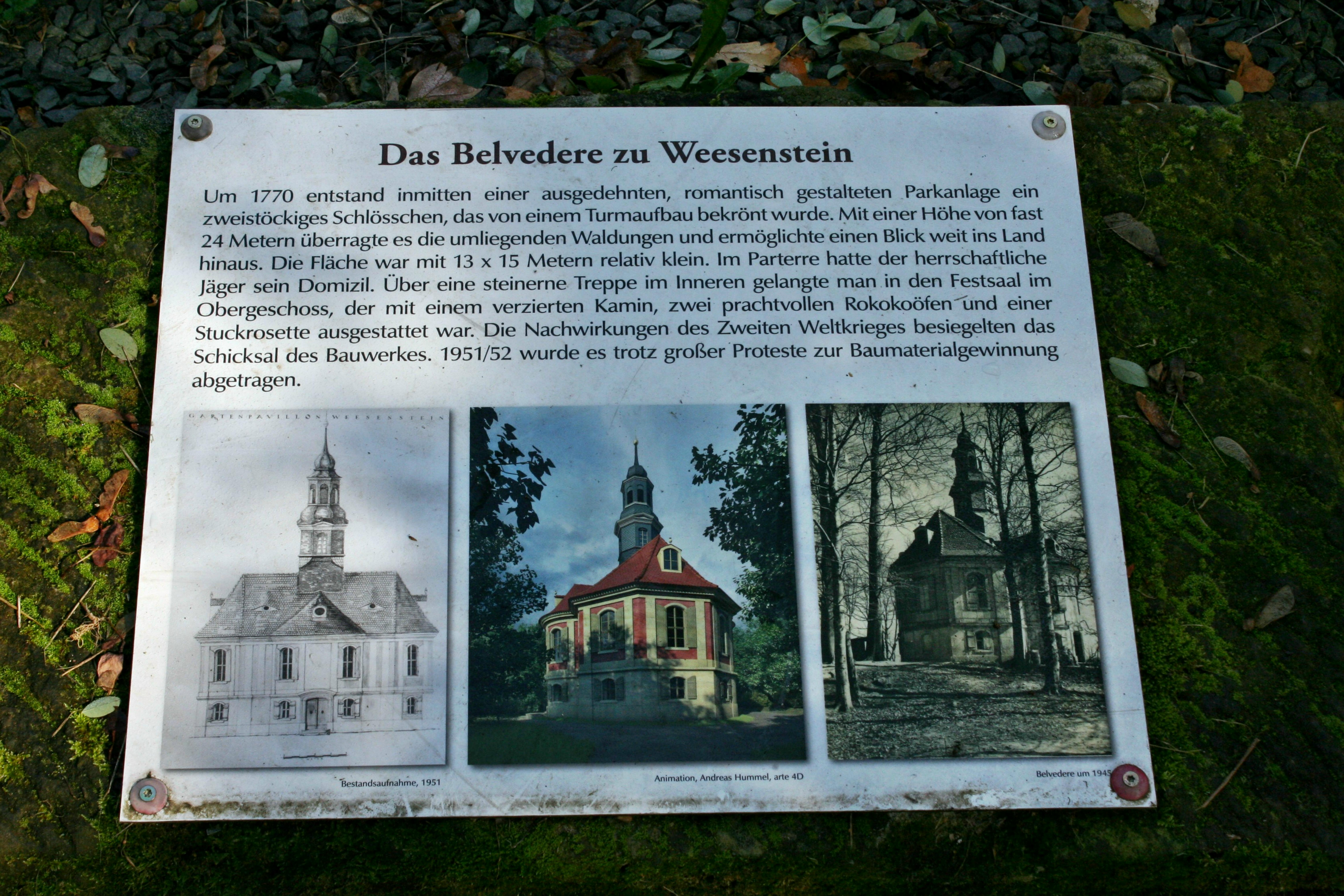 Belvedere Weesenstein, neue Hinweistafel